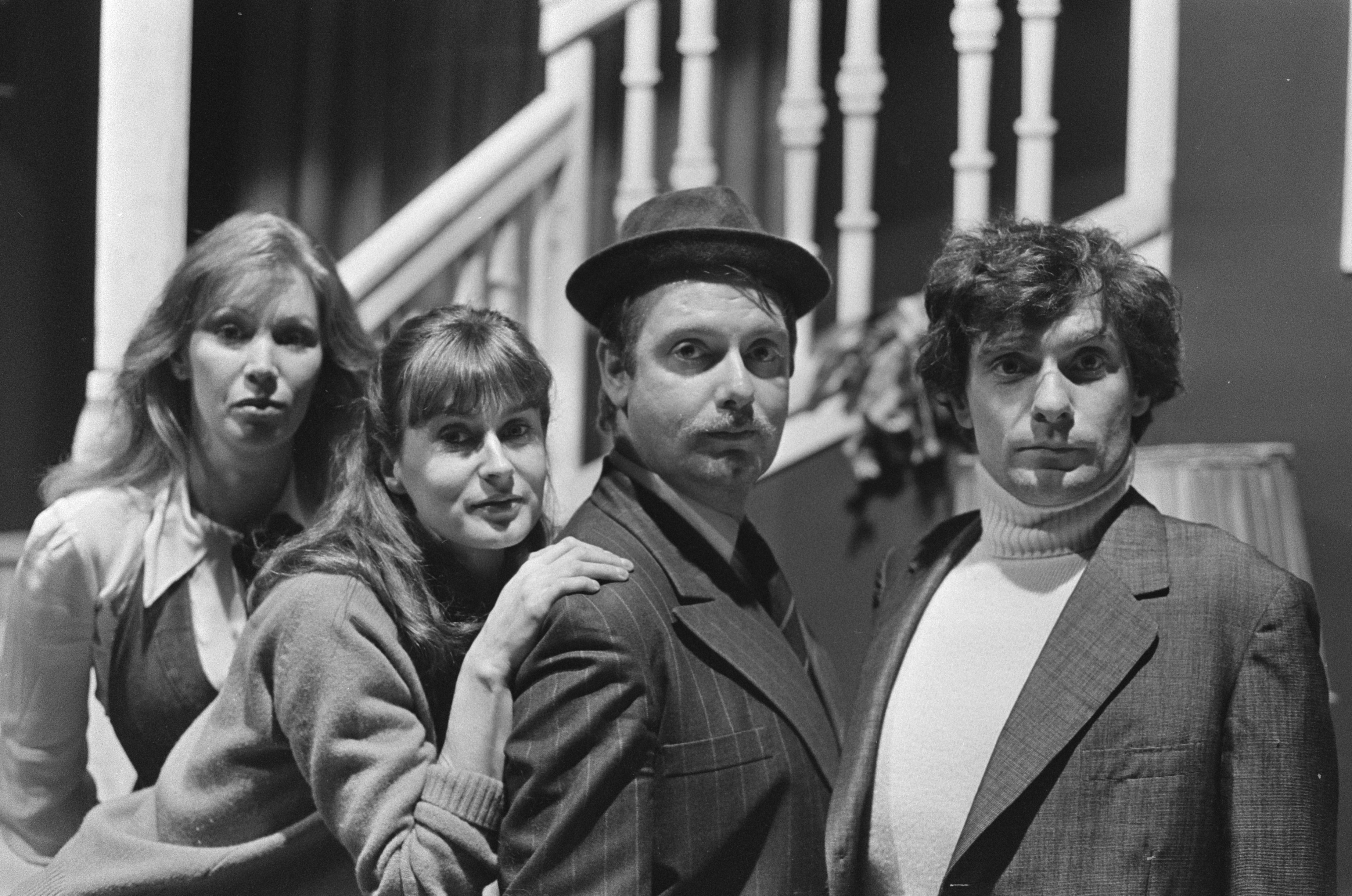 Collectie / Archief : Fotocollectie Anefo Reportage / Serie : [ onbekend ] Beschrijving : Premiere "Vechtpaar" in Nieuwe de la Mar in Amsterdam op 4 november ; v.l.n.r. Mijanou van Baarzel, Martine Crefcoeur, Huib Broos en Gees Linnebank Datum : 4 november 1975 Locatie : Amsterdam, Noord-Holland Persoonsnaam : Baarzel, Mijanou van, Broos, Huib, Crefcoeur, Martine, Linnebank, Gees Fotograaf : Bogaerts, Rob / Anefo, [onbekend] Auteursrechthebbende : Nationaal Archief Materiaalsoort : Negatief (zwart/wit) Nummer archiefinventaris : bekijk toegang 2.24.01.05 Bestanddeelnummer : 928-2523